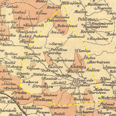 Струмичка каза